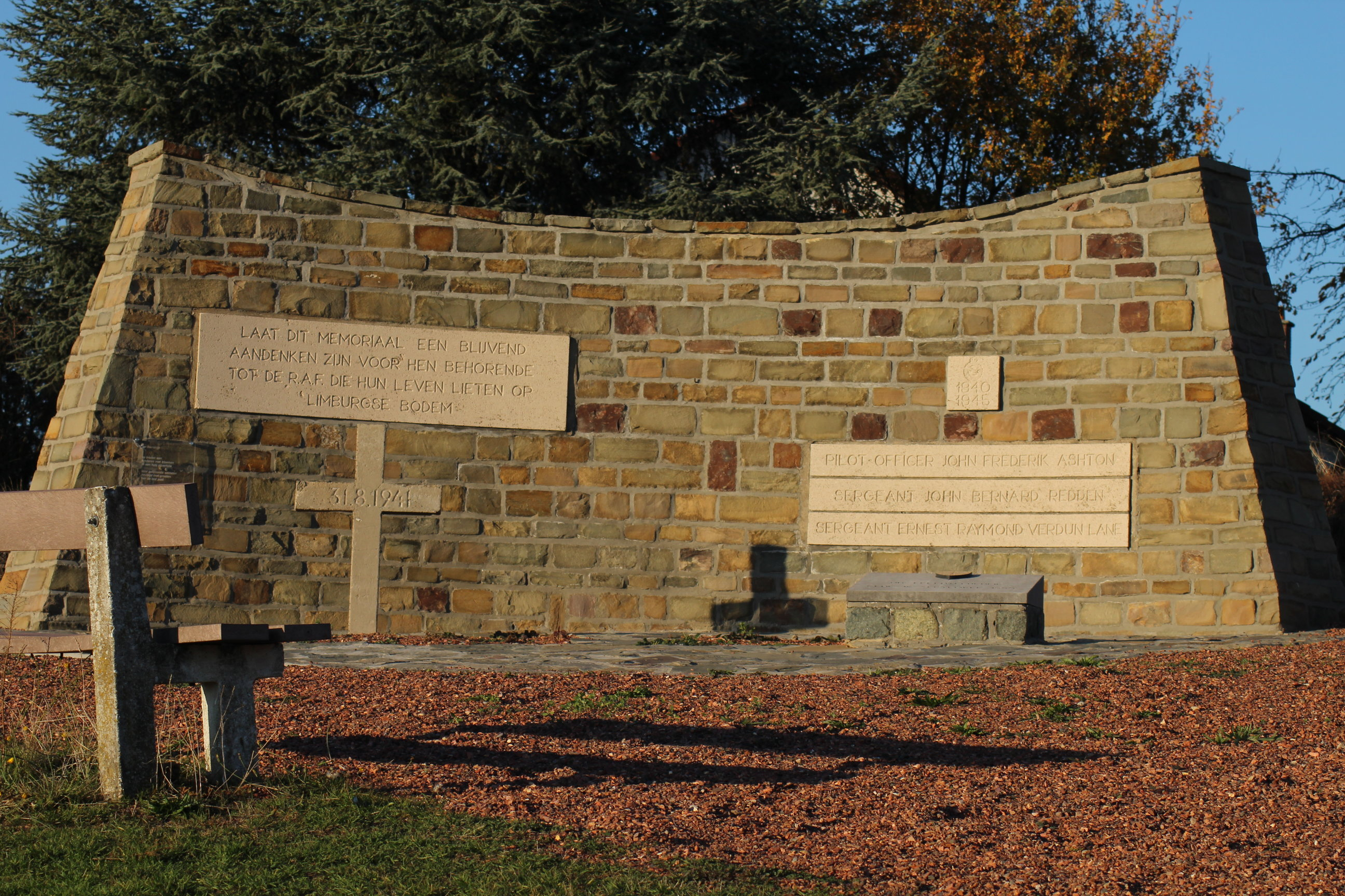 Herdenkingsmonument, opgericht voor de gevallen soldaten van de RAF tijdens WO II.